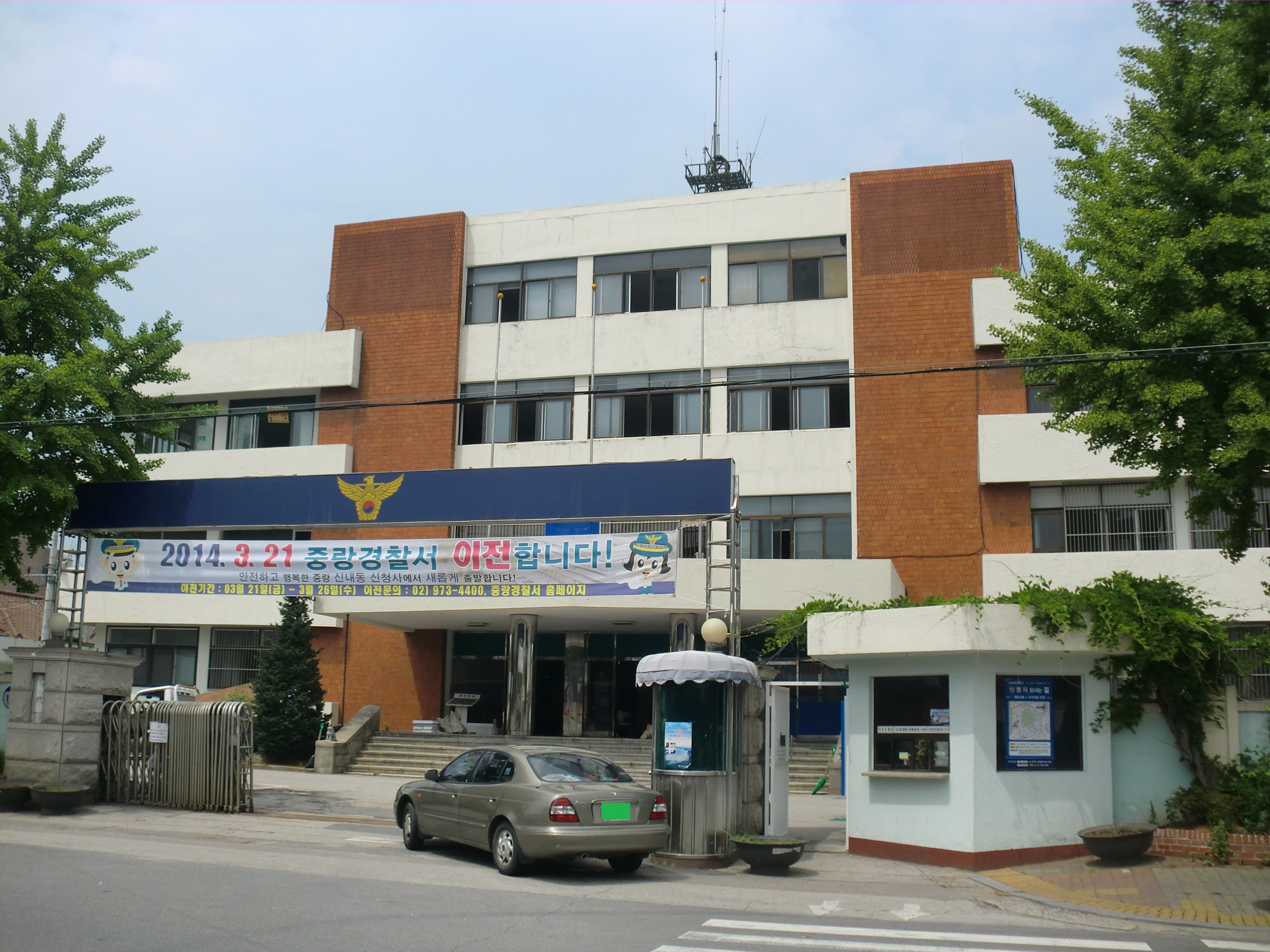 2014년 3월21일 이전의 서울중랑경찰서